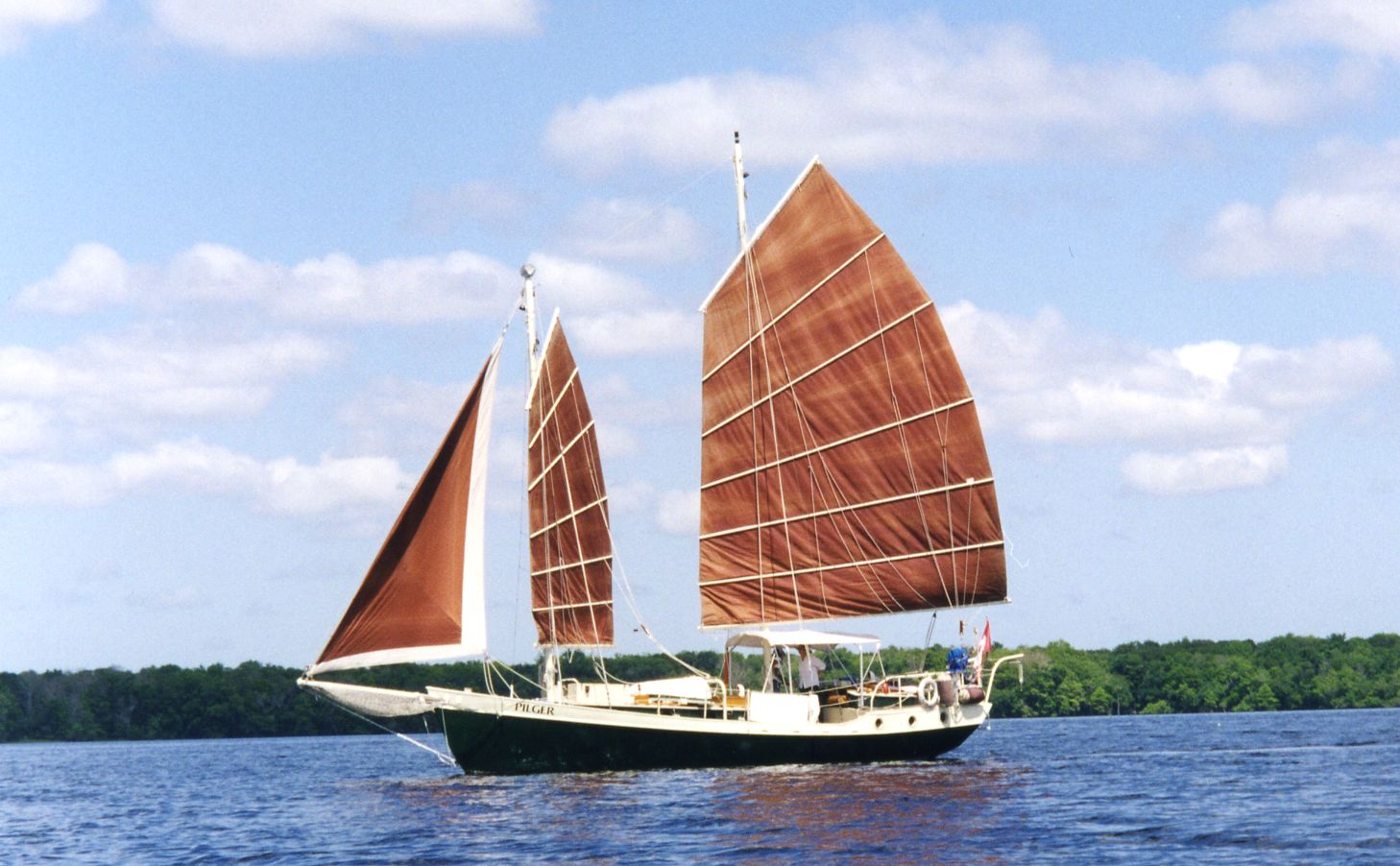 Junk-rigged schooner Pilger sailing in Lake George, Florida